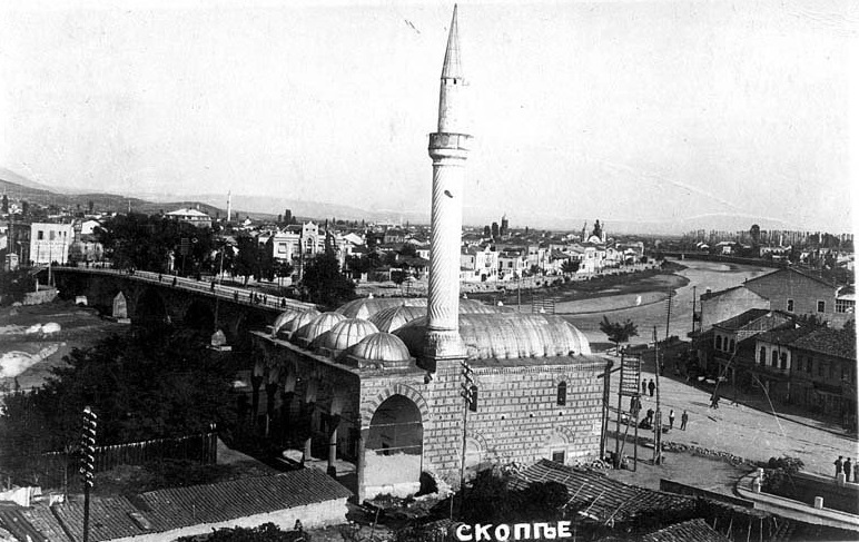 Historical Burmali Mosque in Skopje, Macedonia (†1925)